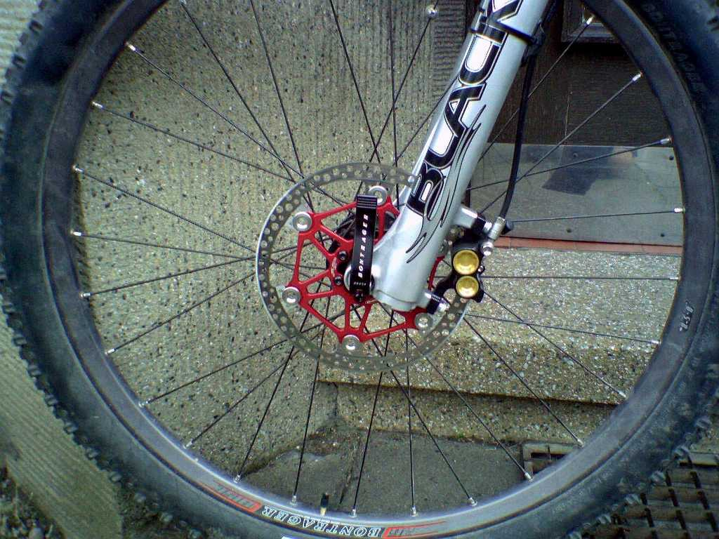 Floating Disc VR